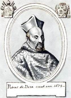 Cardenal Pedro de Deza Manuel (1520-1600)